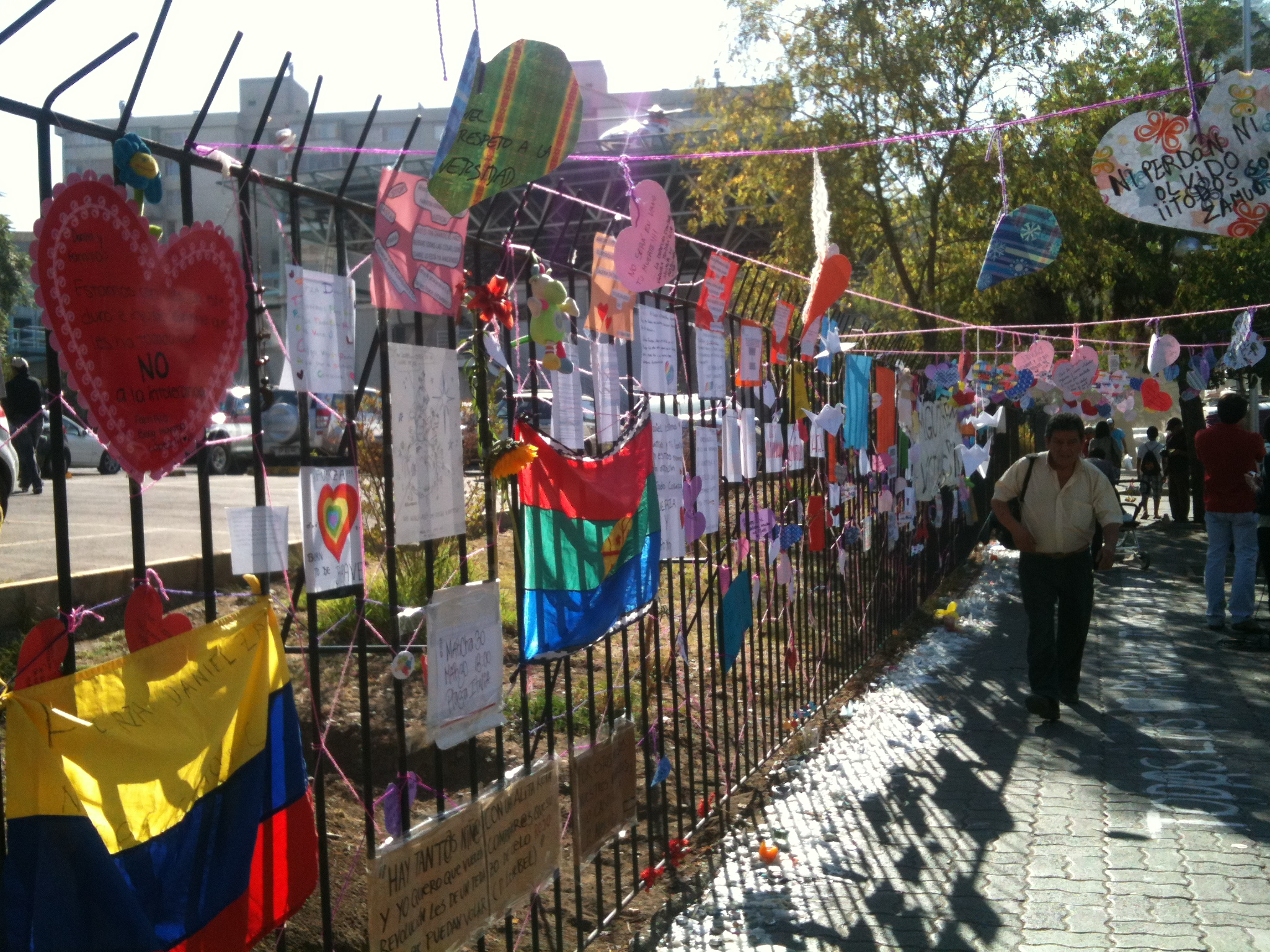 Muestras de cariño a Daniel Zamudio fuera de la Posta Central de Santiago, Chile.